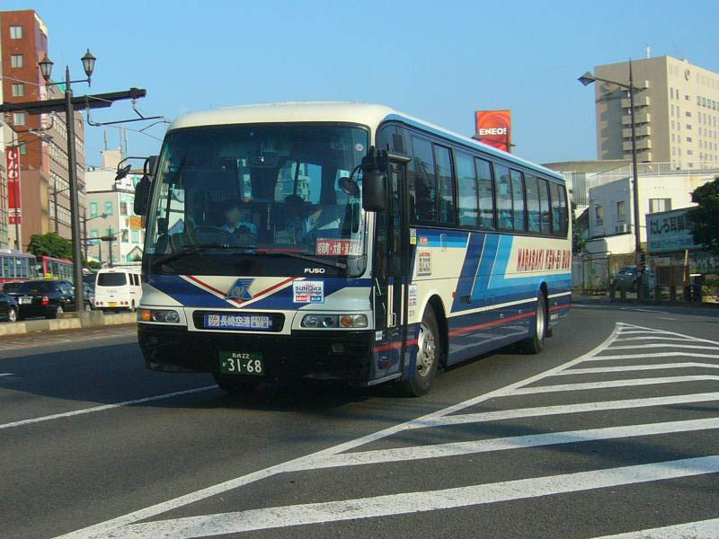 登録番号 長崎22か31-68 長崎県交通局所属 空港リムジン用 2007年7月27日 長崎駅前にて撮影